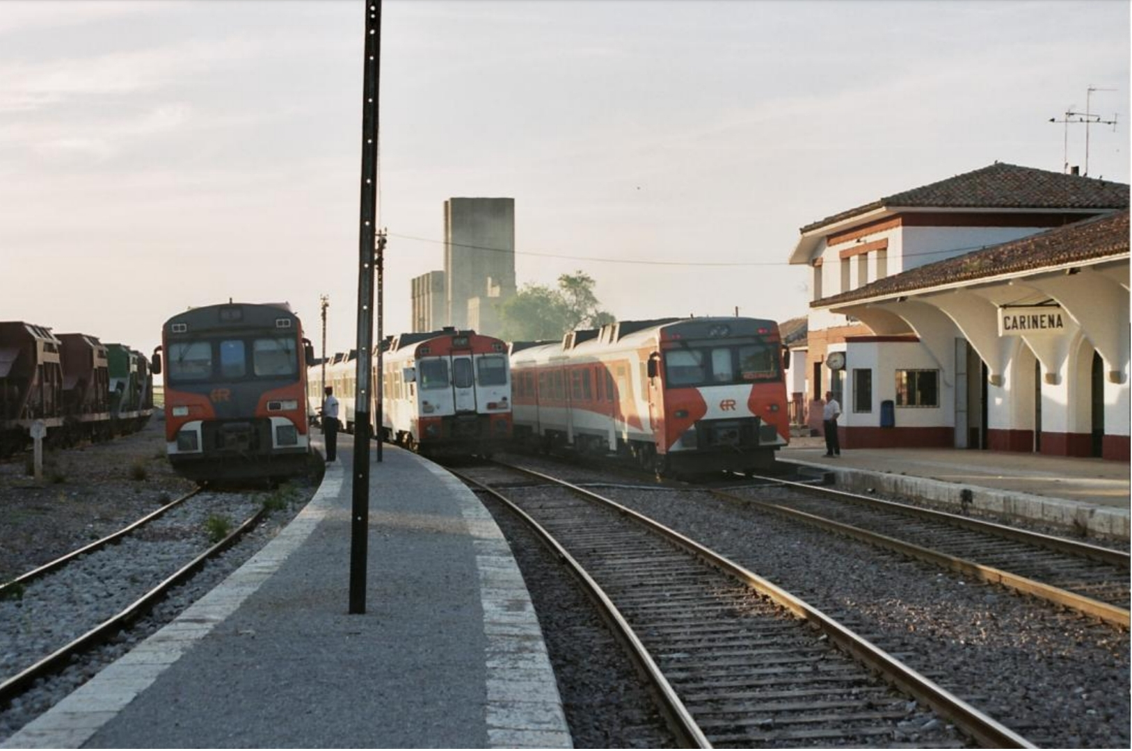 La variedad de automotores que han circulado en la línea Zaragoza-Valencia en los últimos años se refleja plenamente en esta imagen en donde coinciden en la estación de Cariñena tres series diferentes de automotores. De derecha a izquierda, en la vía I MAN s/592.200 del regional Valencia-Huesca, en la vía II un FIAT s/593 sin servicio y en la vía III un FIAT s/596 prestando servicio al regional Zaragoza-Teruel. Cariñena 28 de mayo de 2003.